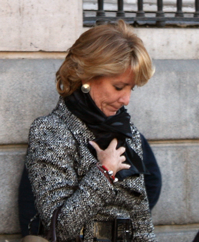 Esperanza Aguirre en la Puerta del Sol de Madrid (4 de marzo de 2009)